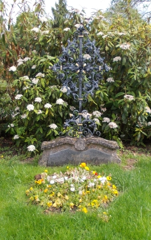 Wiener Zentralfriedhof-Rudolf Henz